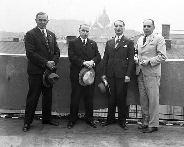 Na dachu Pałacu Prasy stoją od lewej: radny m. Lwowa Roman Dunin, wiceprezydent Lwowa Jan Weryński, wiceprezes Związku Legionistów we Lwowie Józef Ostrzycki, redaktor Janusz Śmiechowski.